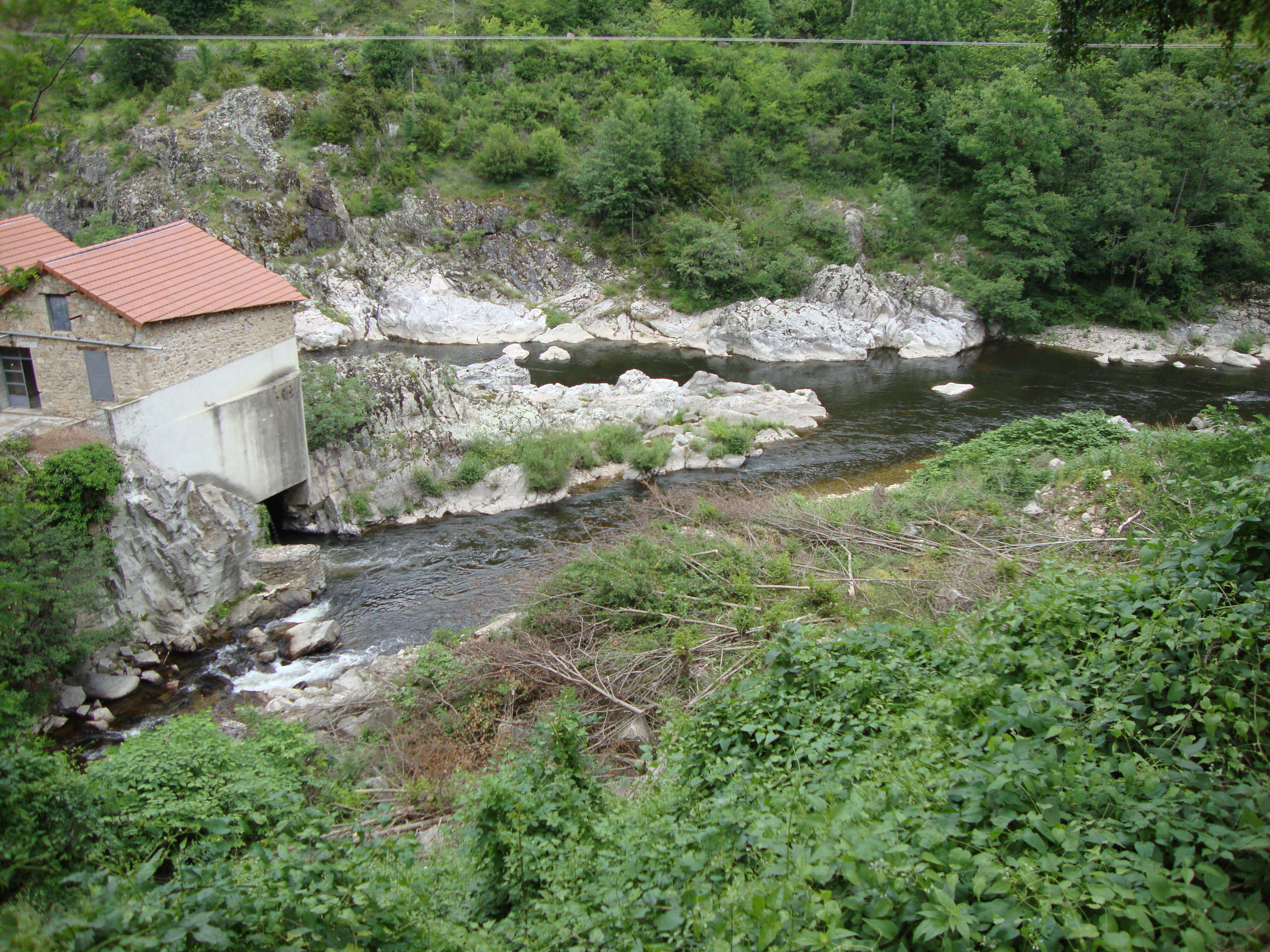 Beauvène, (Ardèche, Fr) le Talaron (à gauche) débouchant dans l'Eyrieux.